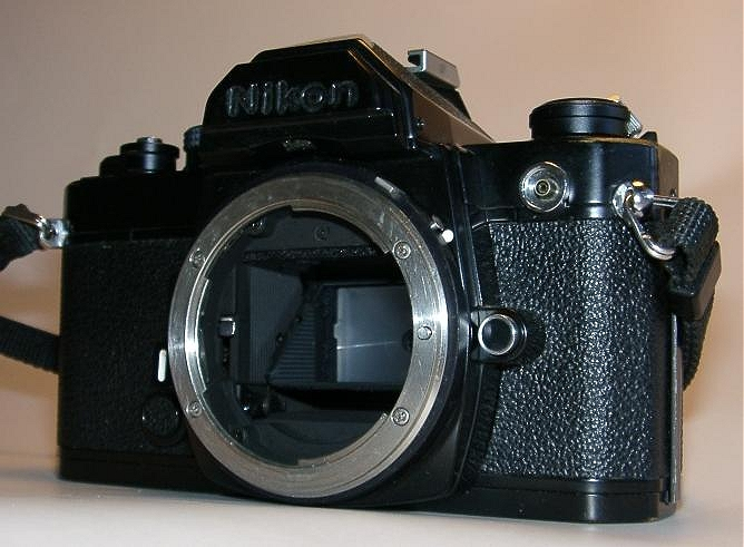 Ett Nikon kamerahus. Foto: Användare:Chrizz